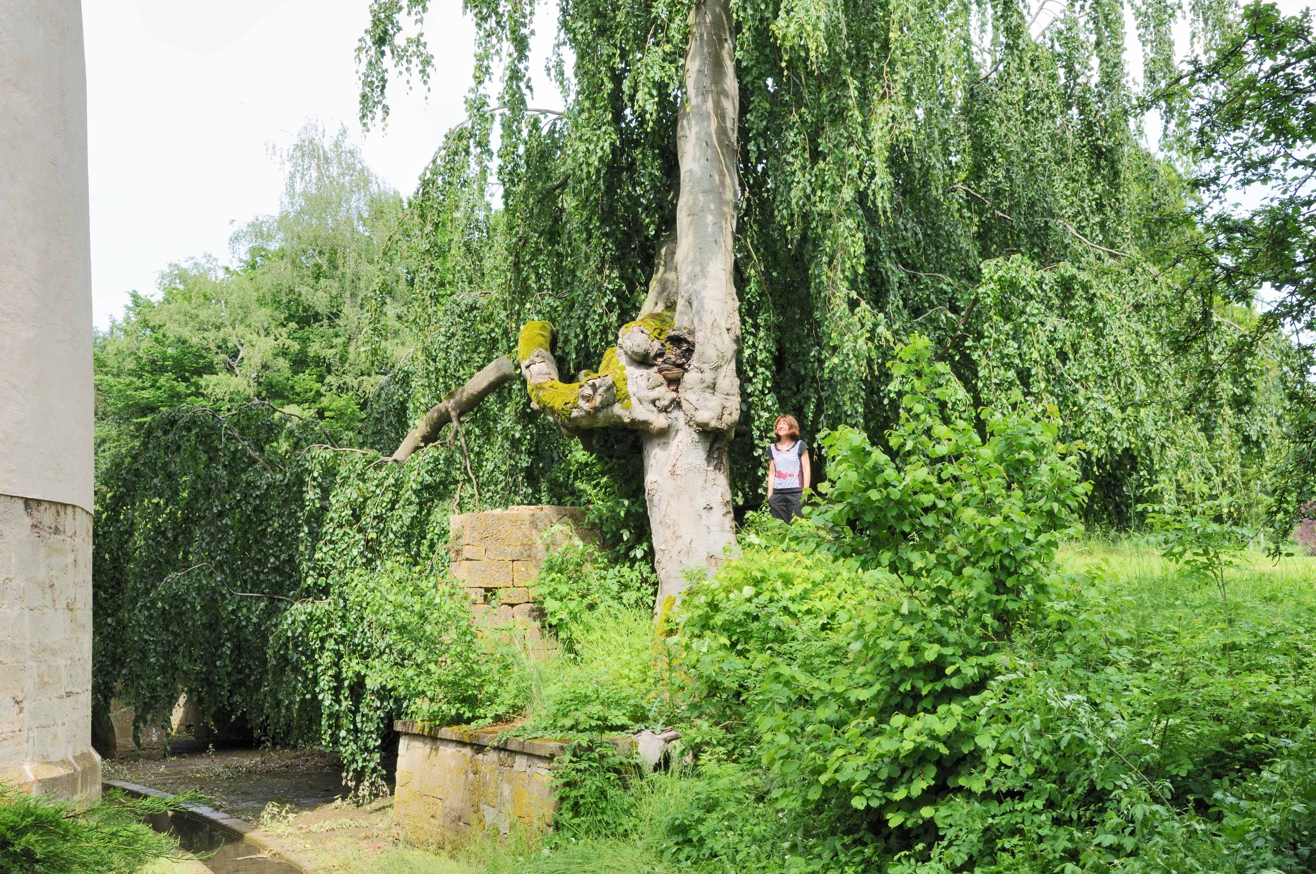 Trauerbuch zu Suessem.